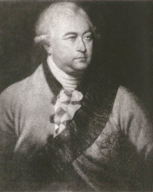 Franciszek Bukaty (1747-1797) polish diplomat